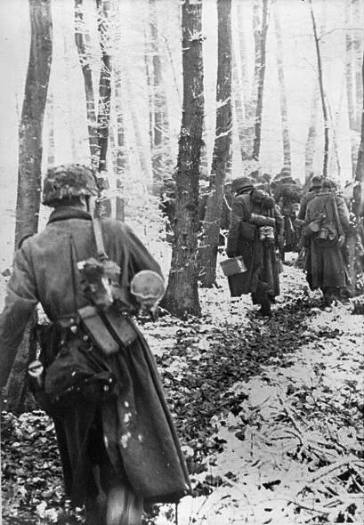 ADN-ZB II. Weltkrieg 1939-45 Ardennenoffensive der faschistischen deutschen Wehrmacht vom 16.12.1944 bis Januar 1945. Nach Anfangserfolgen mußten die deutschen Verbände in denersten Januartagen zur Verteidigung übergehen ud sich bis Ende Januar auf ihre Ausgangsstellungen zurückziehen. Deutsche Infanterie geht in den letzen Dezembertagen im Waldgelände vor. Aufnahme: Rutkowski [Scherl]